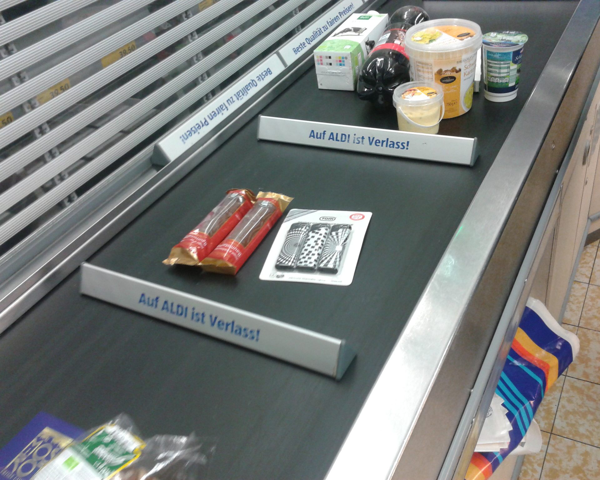 Warentransportband bei Aldi